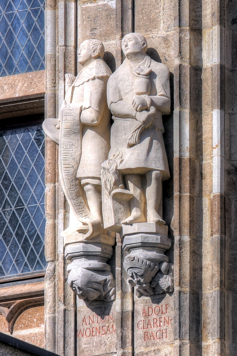 Rathausturm Köln mit den Figuren des Anton Woensam und Adolf Clarenbach Details zu der Statue: Bildhauer der Woensam-Statue: Rudolf Wuttke Bildhauer der Clarenbach-Statue: Rudolf Wuttke Details zu der Konsole: Thema der Konsole unter der Woensam-Statue: „Polyhymnia“. Bildhauer: Heribert Calleen Thema der Konsole unter der Clarenbach-Statue: „Melpomene“. Bildhauer: Heribert Calleen